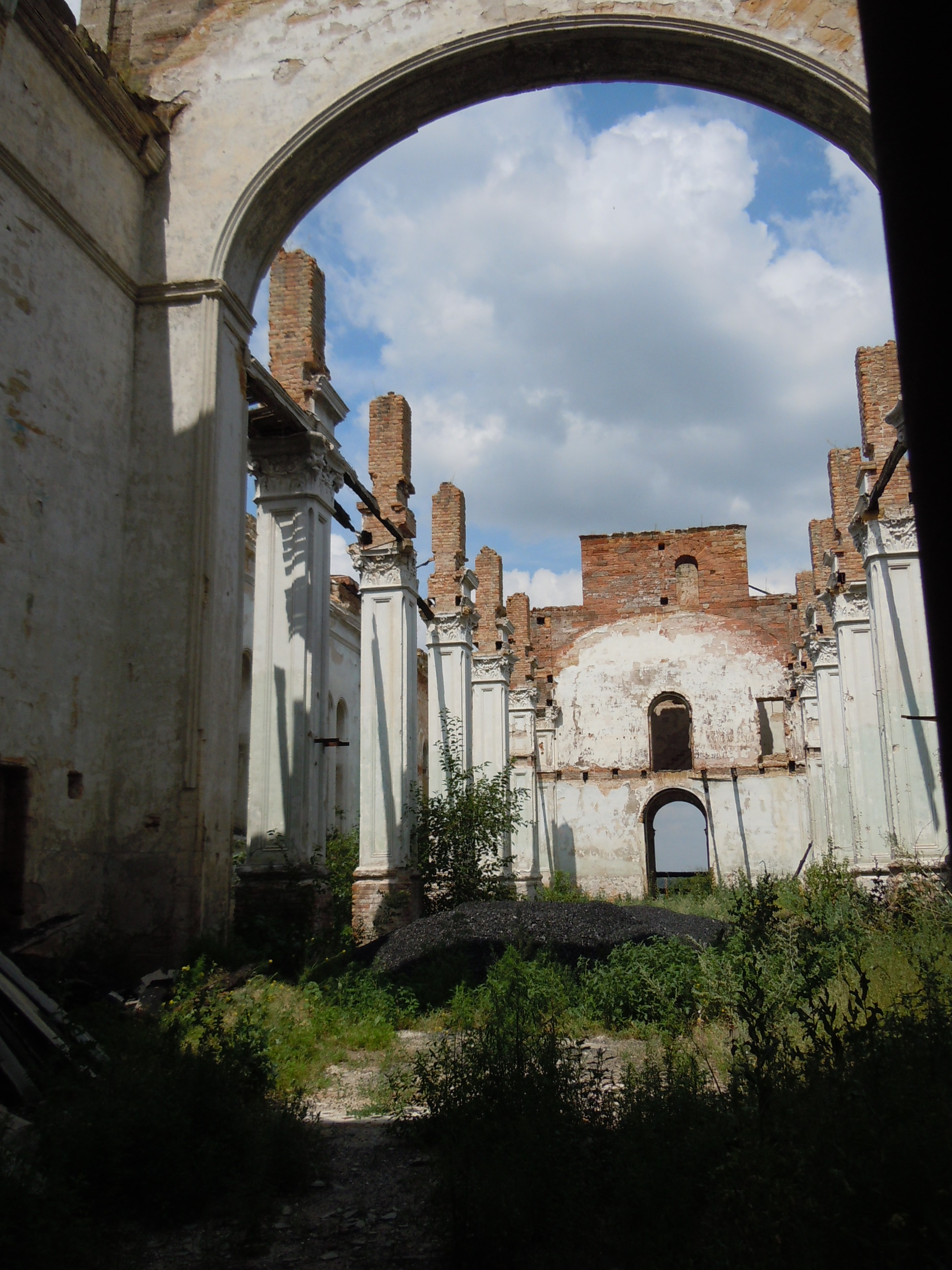 Інтер'єр церкви Пресвятої Трійці в селі Лиманське, Одеська область